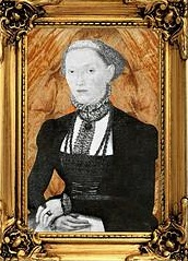 Gemälde von Margarete von Kuenheim (1534-1570)